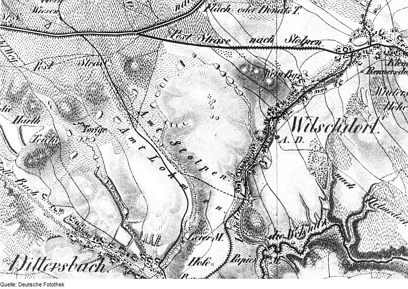 Original image description from the Deutsche Fotothek Dürrröhrsdorf-Dittersbach-Wilschdorf. Oberreit, Sect. Dresden, 1821/22